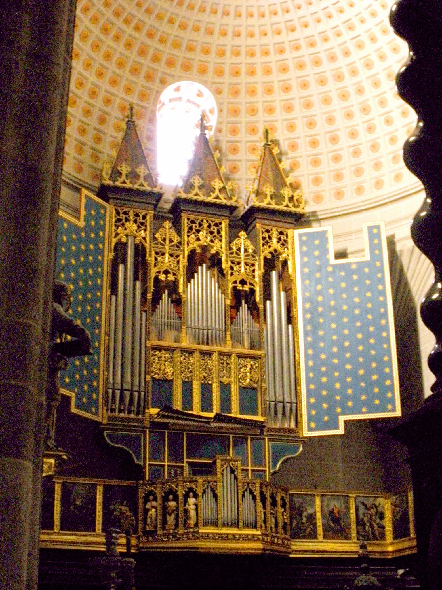 Colegiata de Santa Maria de los Sagrados Corporales (Daroca, Zaragoza)